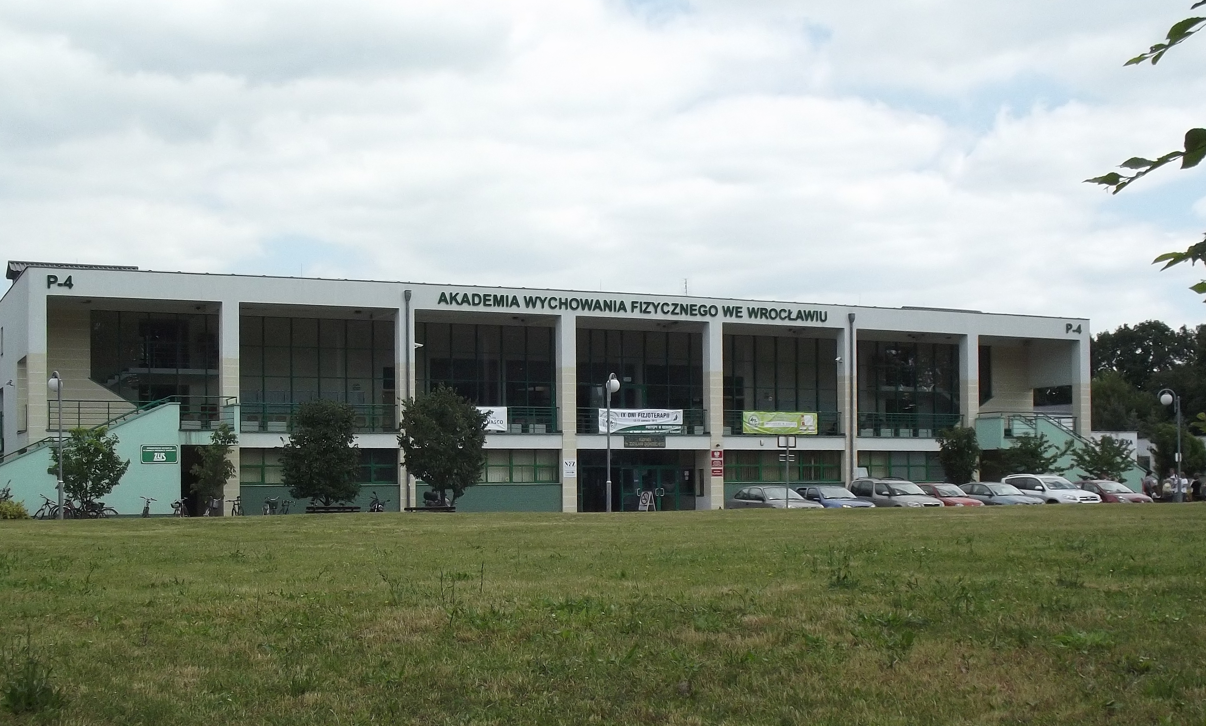 Wydział Fizjoterapii AWF